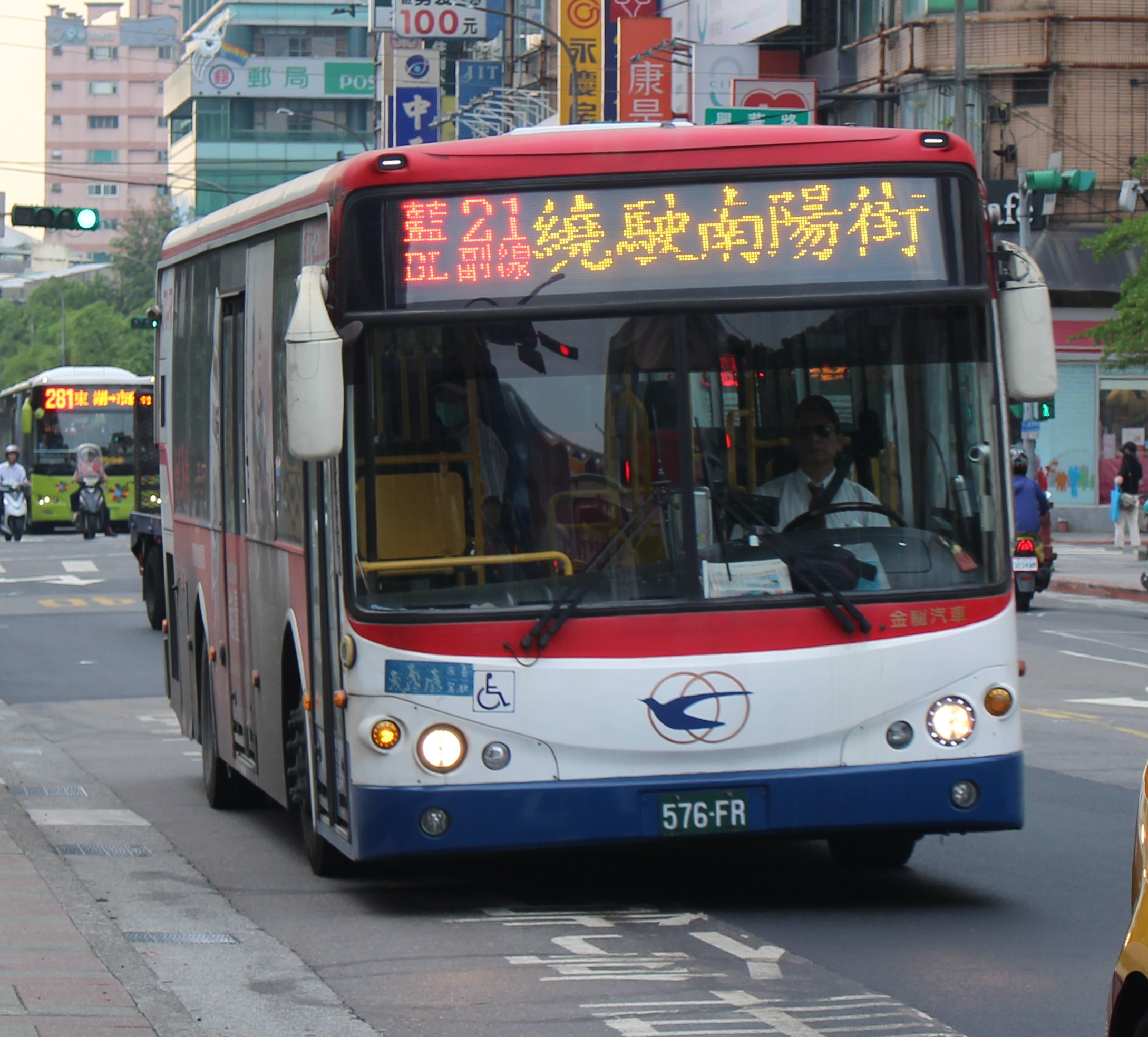 光華巴士2012 KINGLONG KL6112U1 576-FR 藍21副線